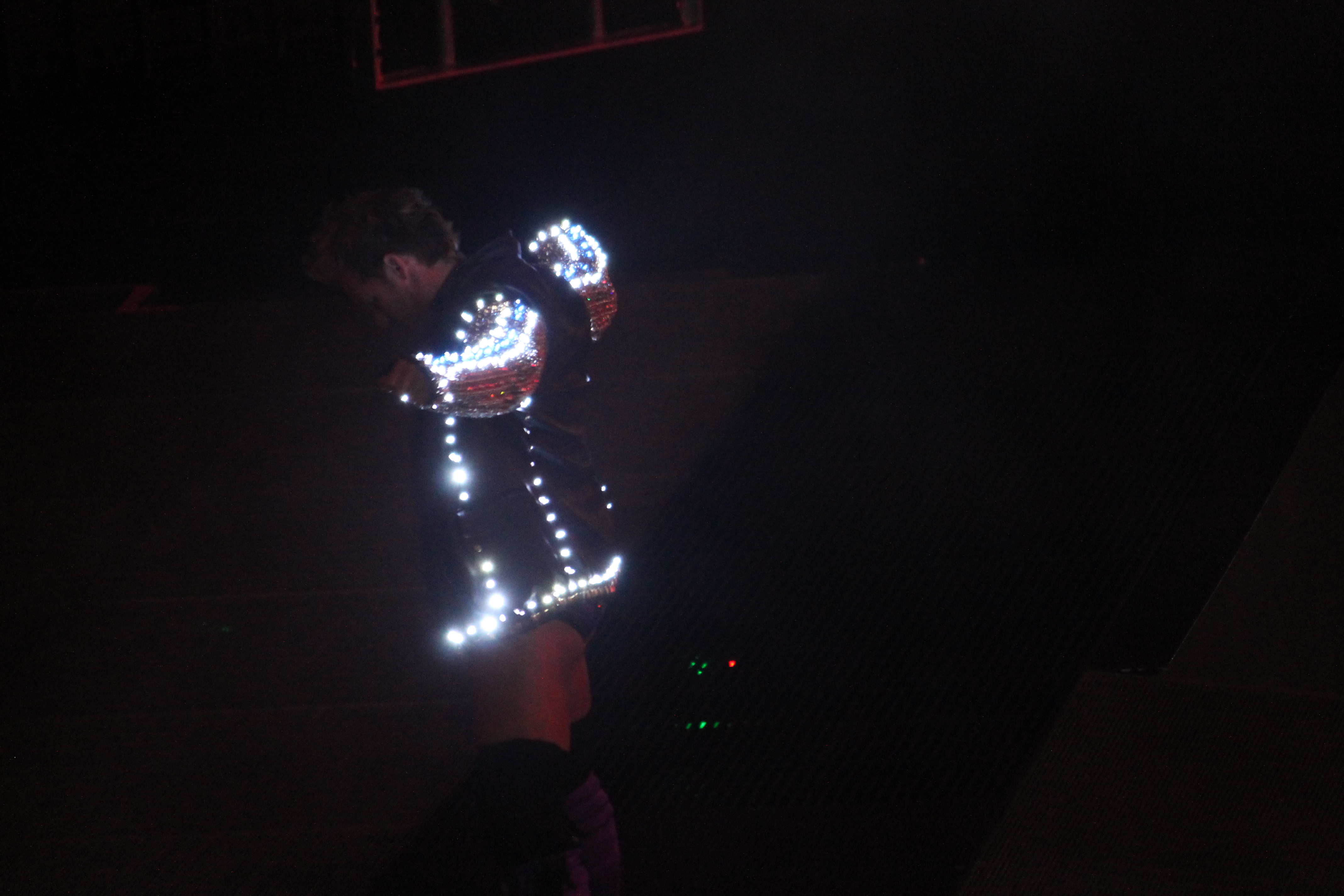 jericho new look